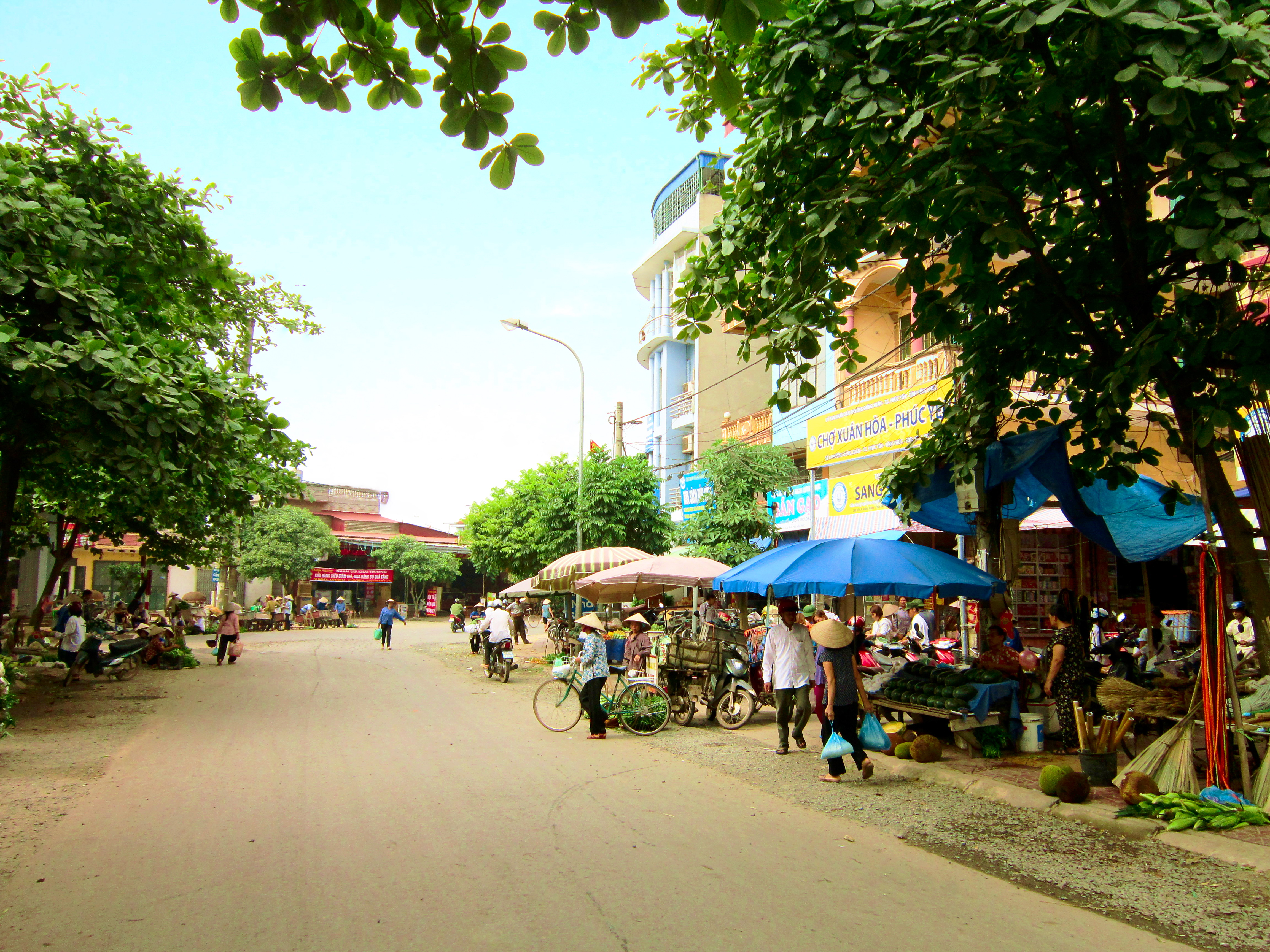 Chợ Xuân Hòa thuộc phường Đồng Xuân, thành phố Phúc Yên, tỉnh Vĩnh Phúc, Việt Nam.